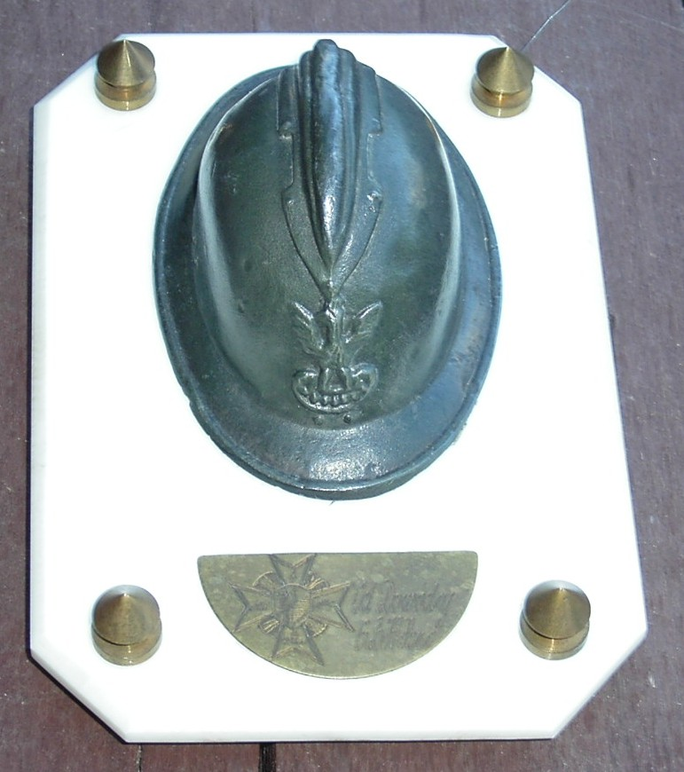 Miniatura hełmu kawaleryjskiego wręczana przez dowódcę 6 Brygady Kawalerii Pancernej "na pamiątkę".